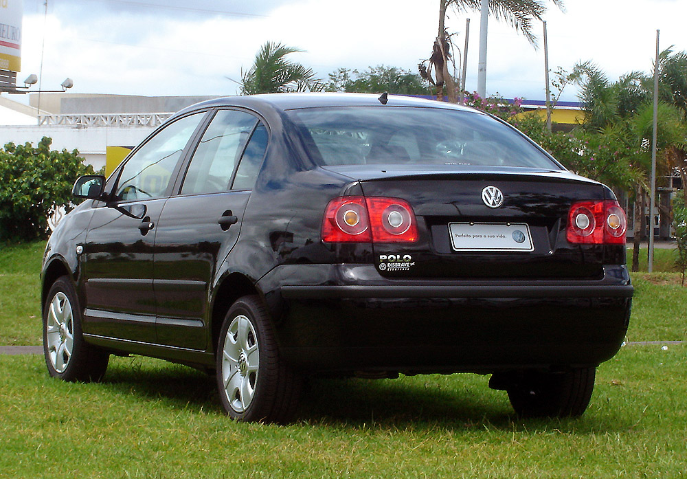 Volkswagen Polo Sedan